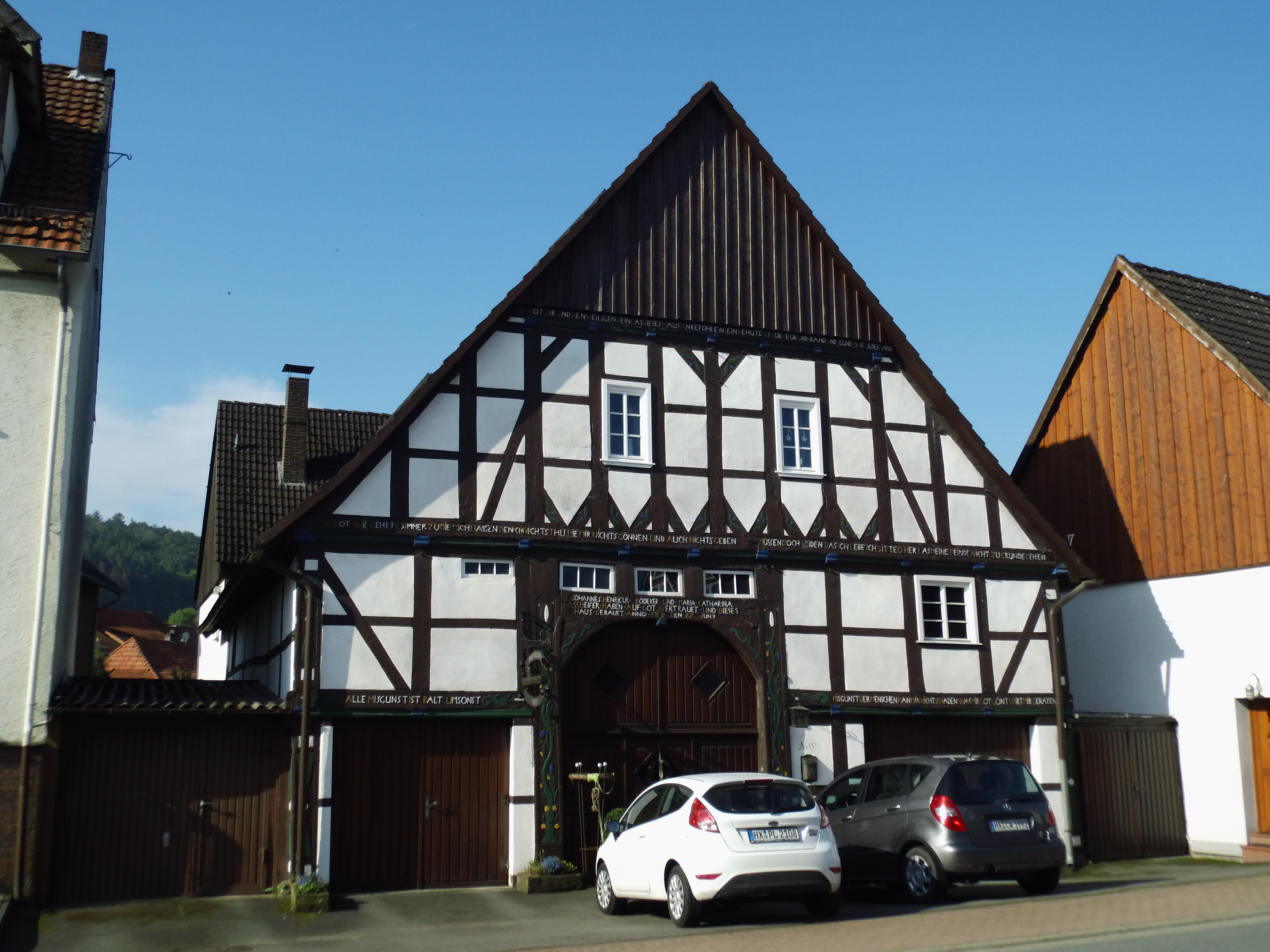 Baudenkmal, Liste der Baudenkmäler in Beverungen Nr. 59